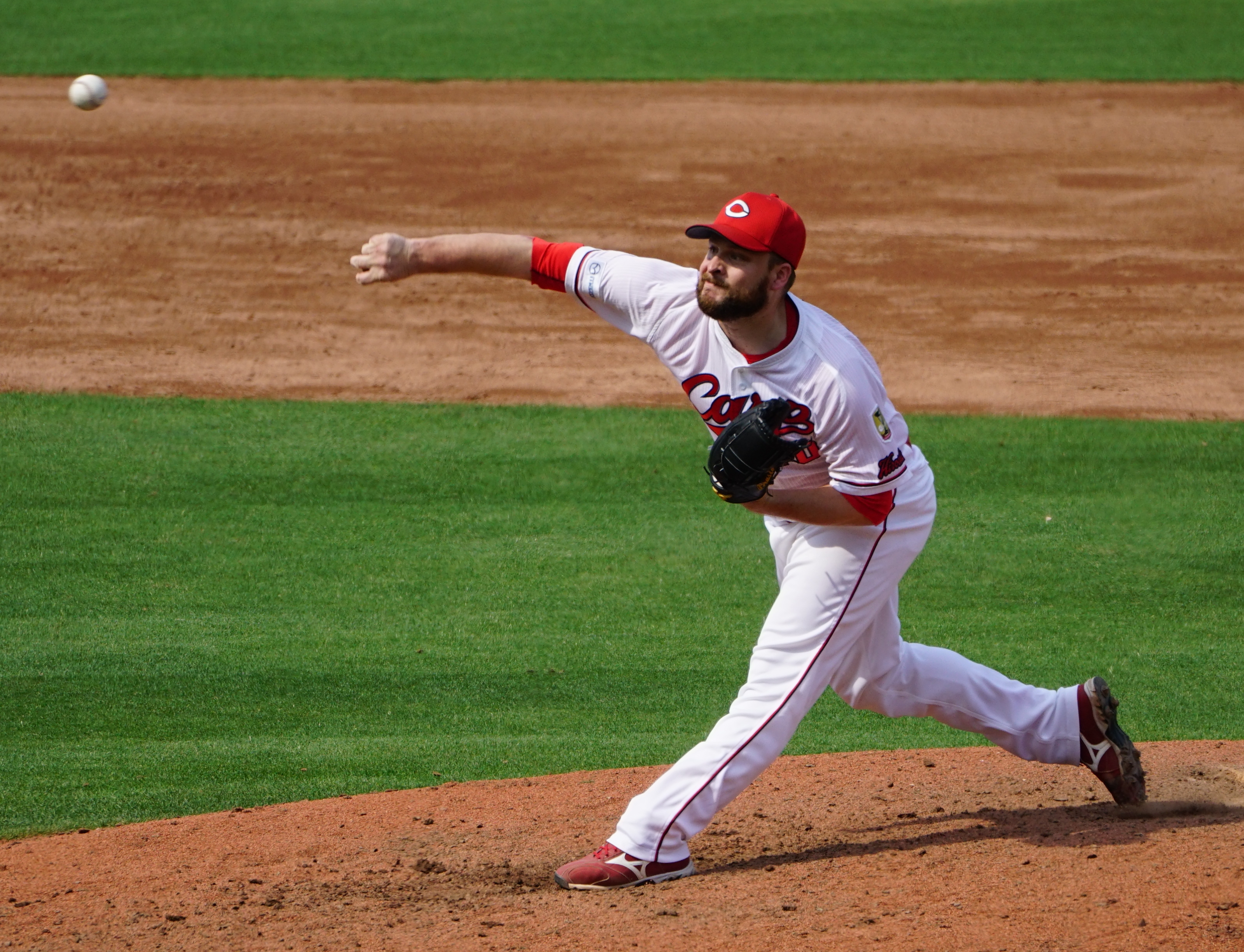 2017年6月10日、MAZDA Zoom-Zoom スタジアム広島の2軍戦（対オリックス）にて